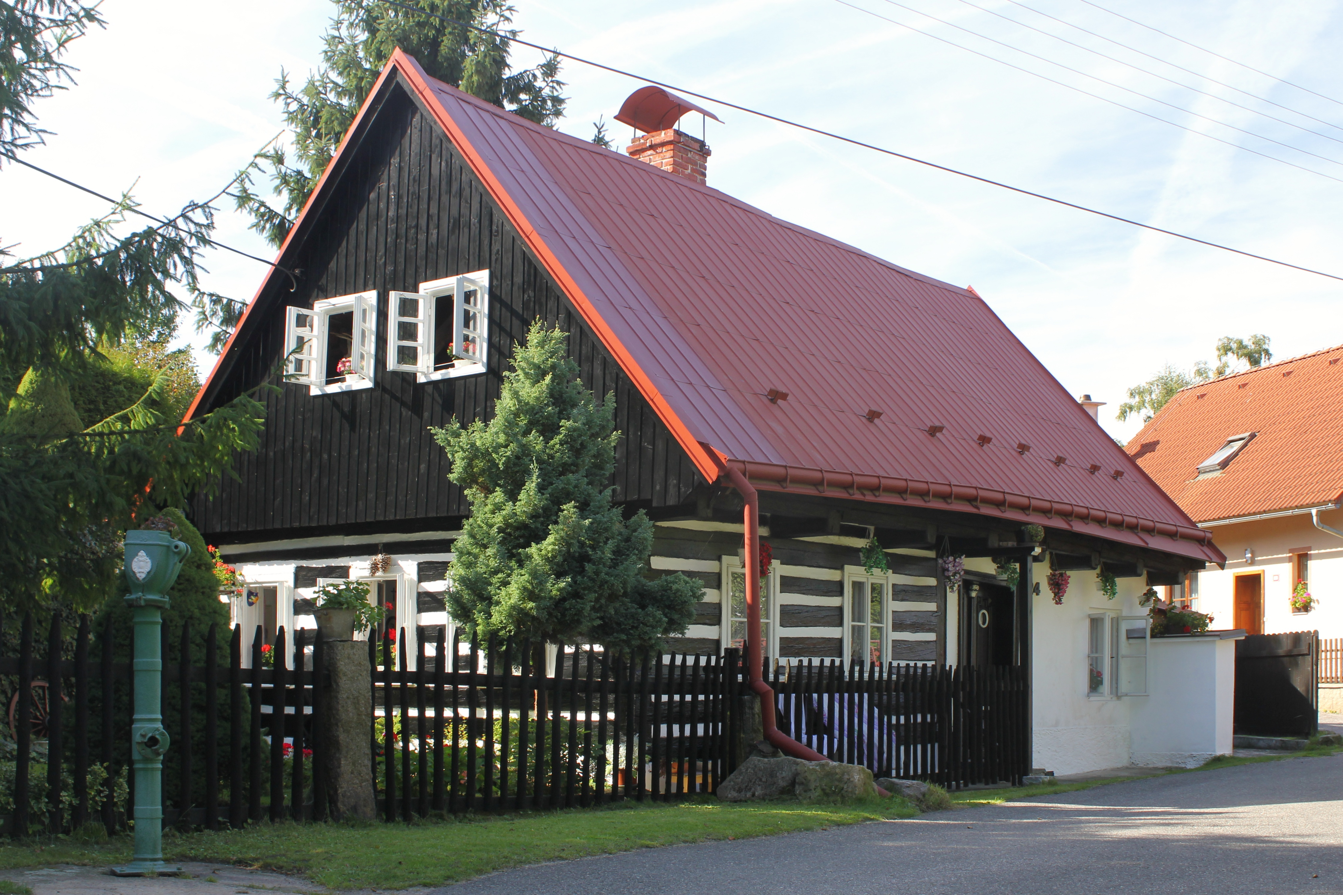 Sportovní ev.č. 24, Hodkovice nad Mohelkou